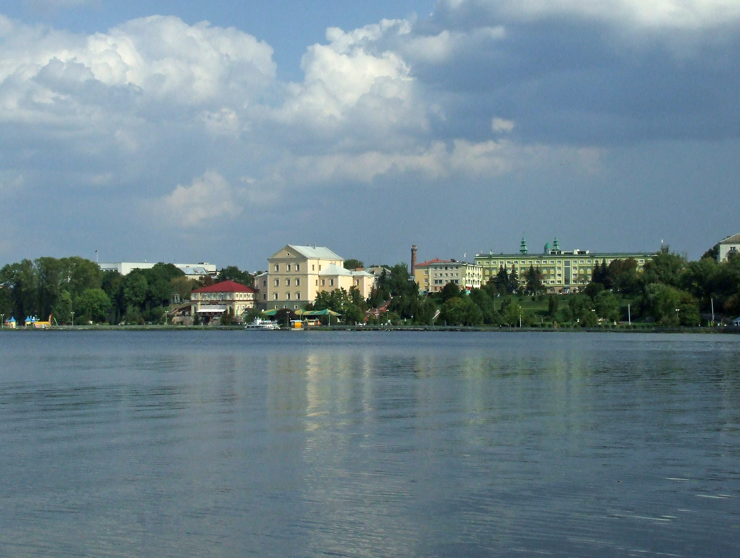 Тернопільський став: Тернопільський став